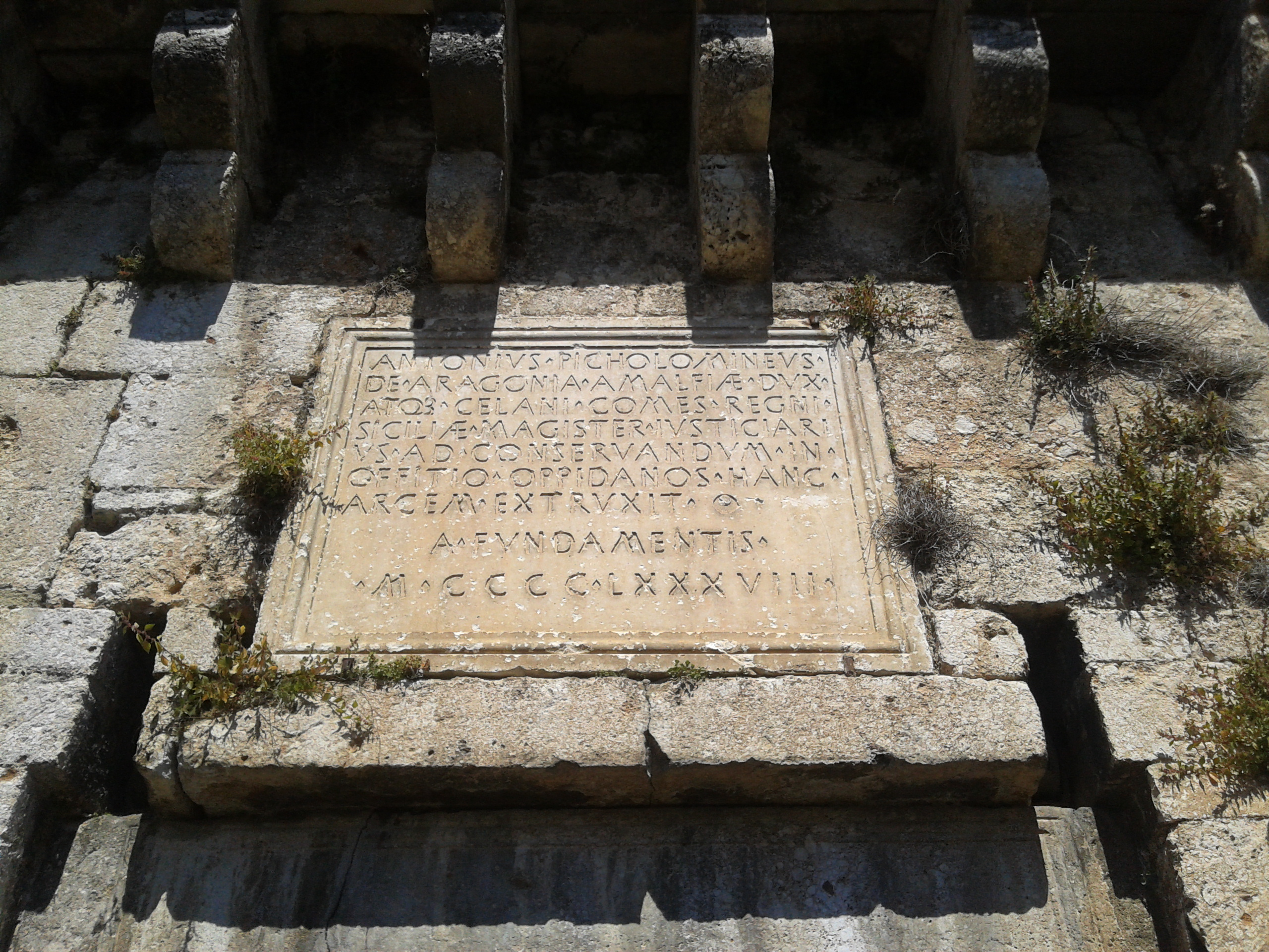 Castello Piccolomini di Ortucchio: iscrizione porta d'ingresso